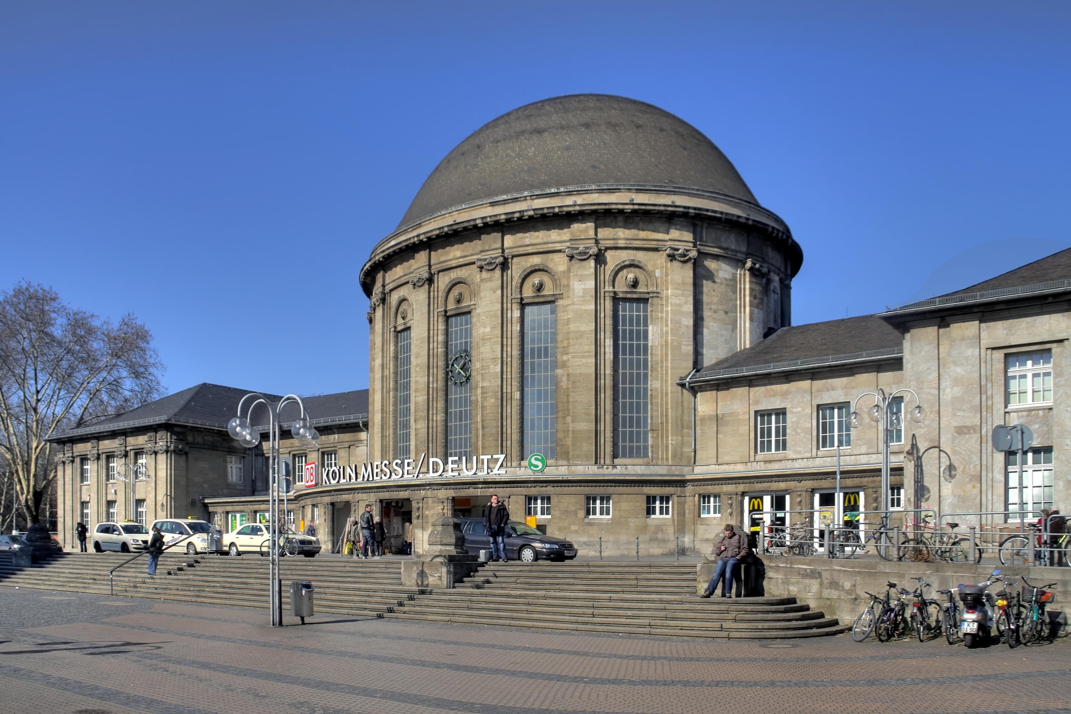 Bahnhofsgebäude Köln Messe/Deutz. Gesamtansicht.